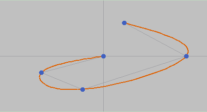 C2 kubicky splajn v nasem editoru